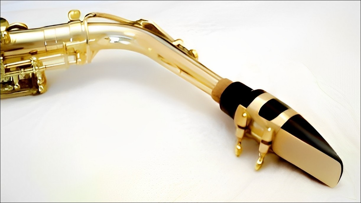 Un bec de saxophone